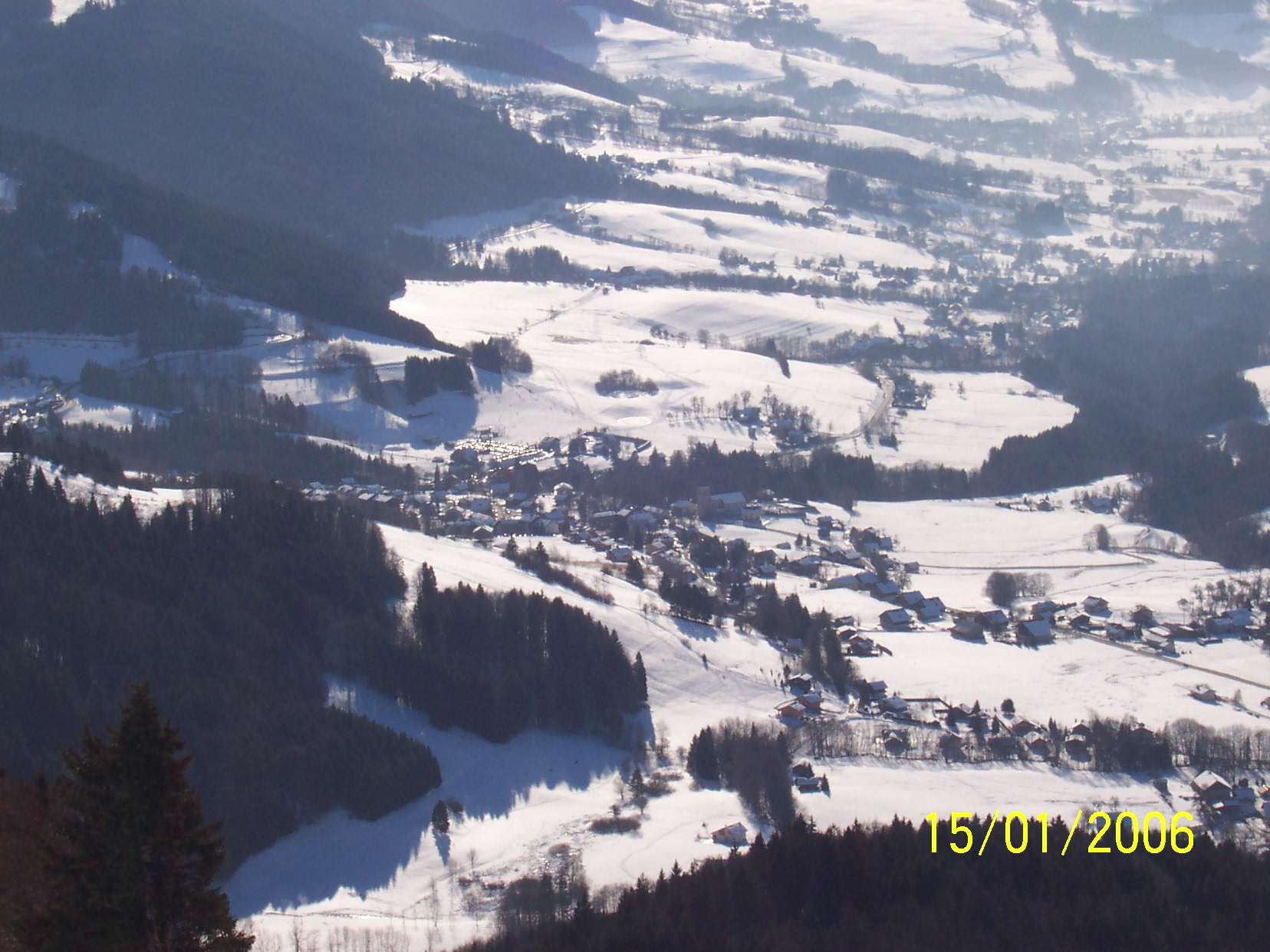 vue sur la Vallée Verte